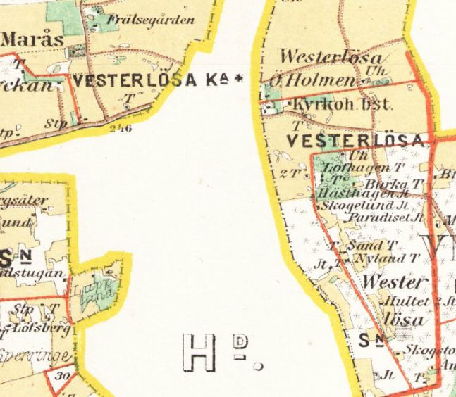 Utsnitt ur karta över Vifolka härad som visar användning av allograferna och .